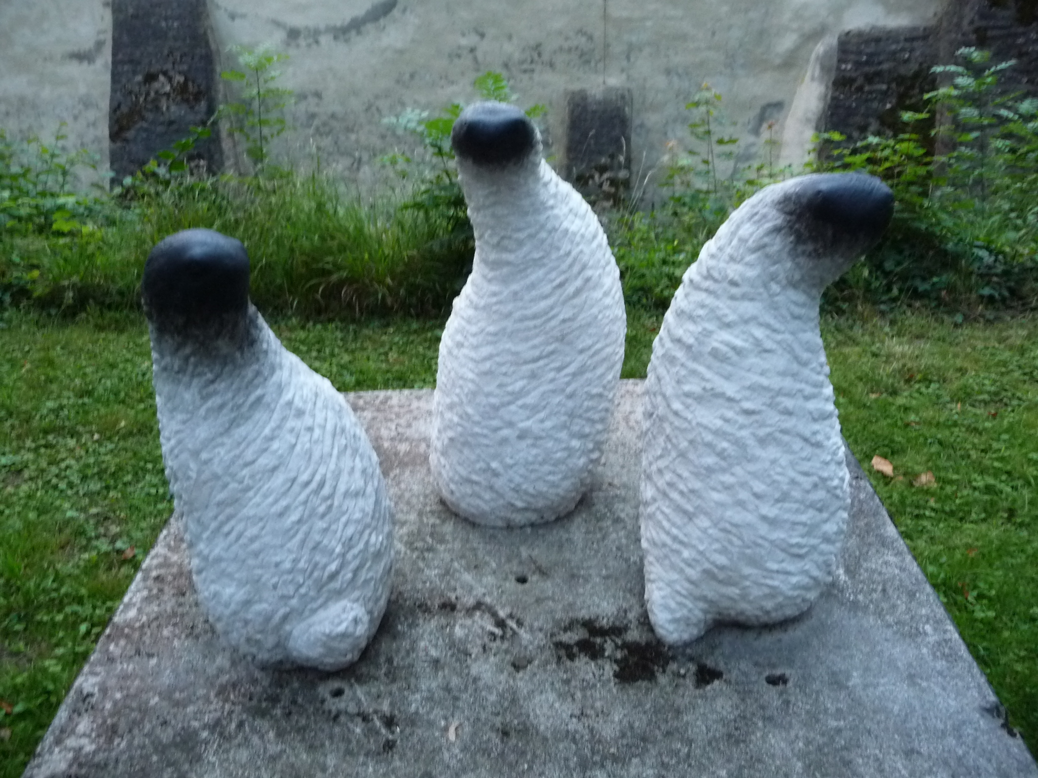 Skulpturen von Claudia Dietz (1967–) DescriptionGerman designer, sculptress and stonemasonDate of birth 1967 Location of birth Stuttgart Authority control : Q19842622 creator QS:P170,Q19842622 in Jagsthausen im Landkreis Heilbronn, nördliches Baden-Württemberg